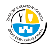 эмблема СКП